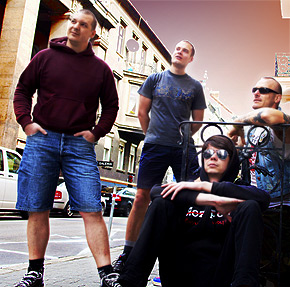 Členovia skupiny Rozpor v roku 2014